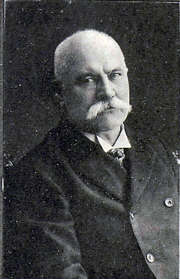 Иван Корнильевич Покровский (в Думе Покровский 1-й[1]; 1845 — после 1912) — подпоручик, губернский секретарь, предприниматель, меценат, гласный Челябинской городской думы, депутат III Государственной Думы (1907—1912).